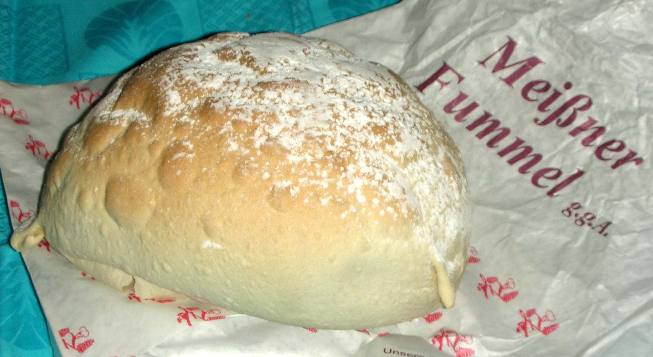 Meißner Fummel Meißner Fummel ist eine Spezialität aus Meißen. Es ist ein Hohlgebäck. Die Sage berichtet, dass es unzerbrochen von Meißen nach Dresden transportiert werden musste.